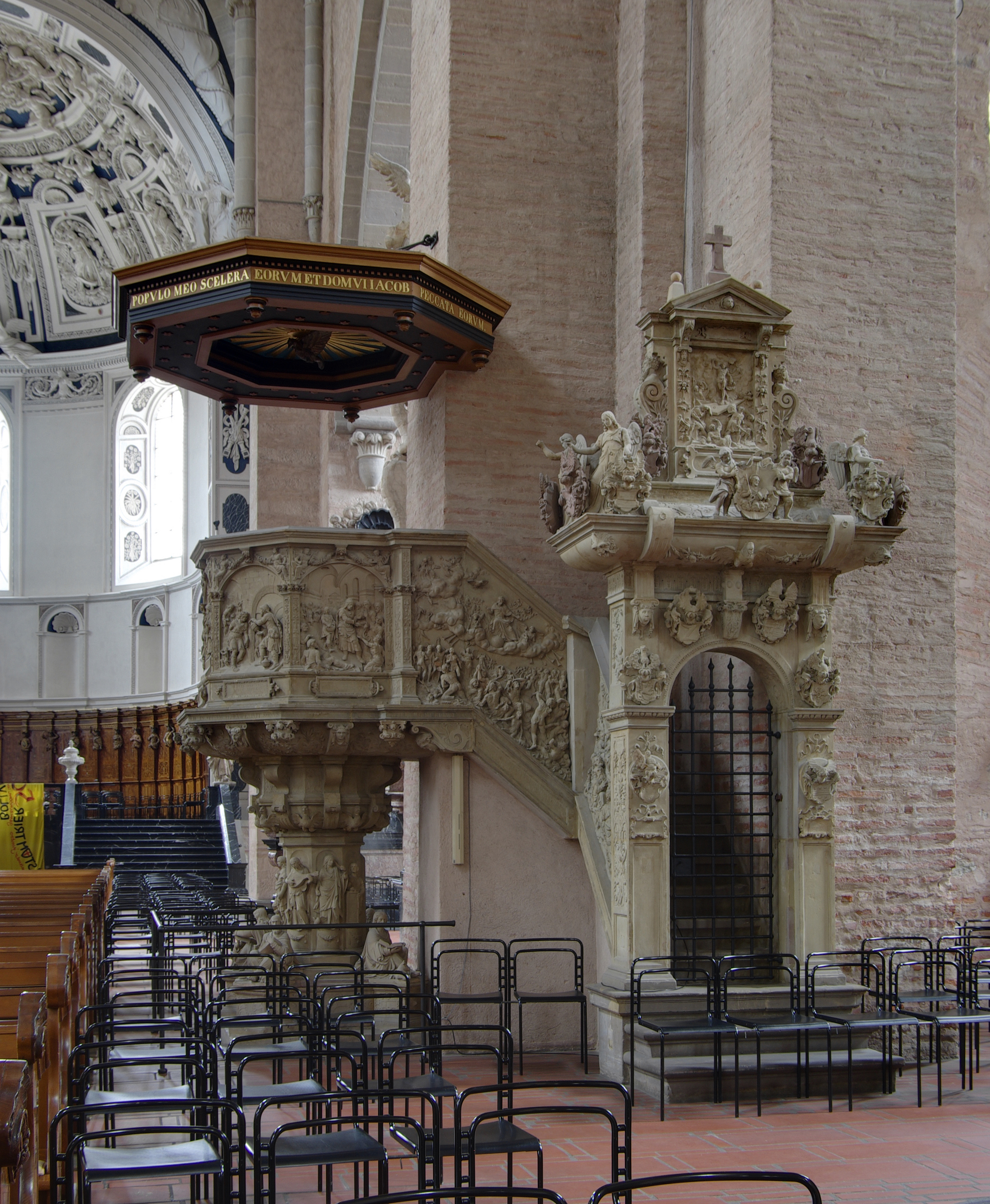 Trierer Dom, Kanzel